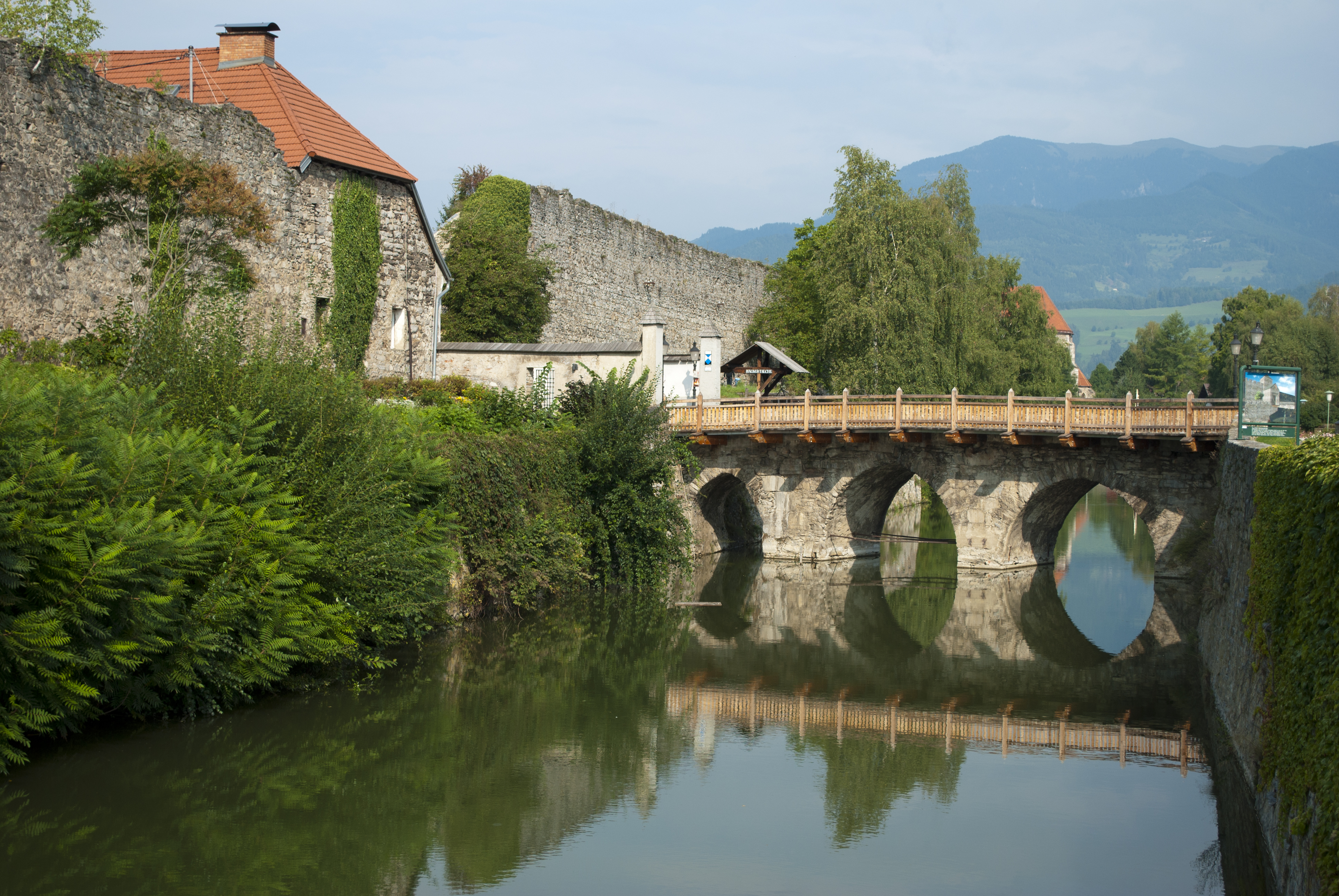 Olsatorbrücke